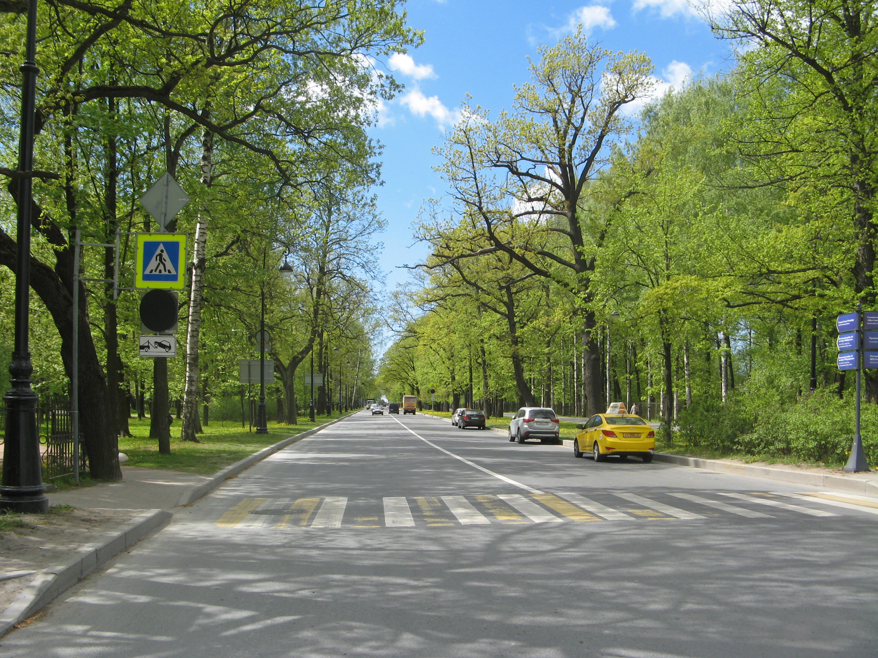 Крестовский проспект в Санкт-Петербурге